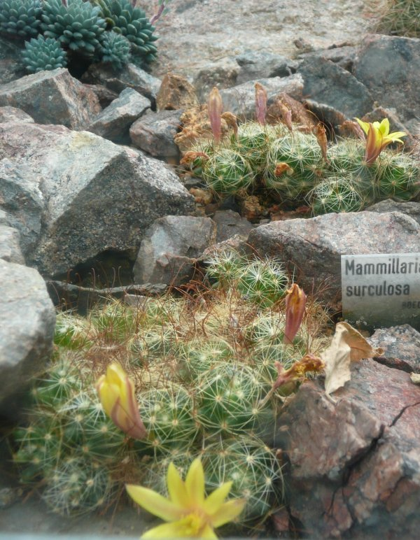 Botanischer Garten Erlangen, 2008